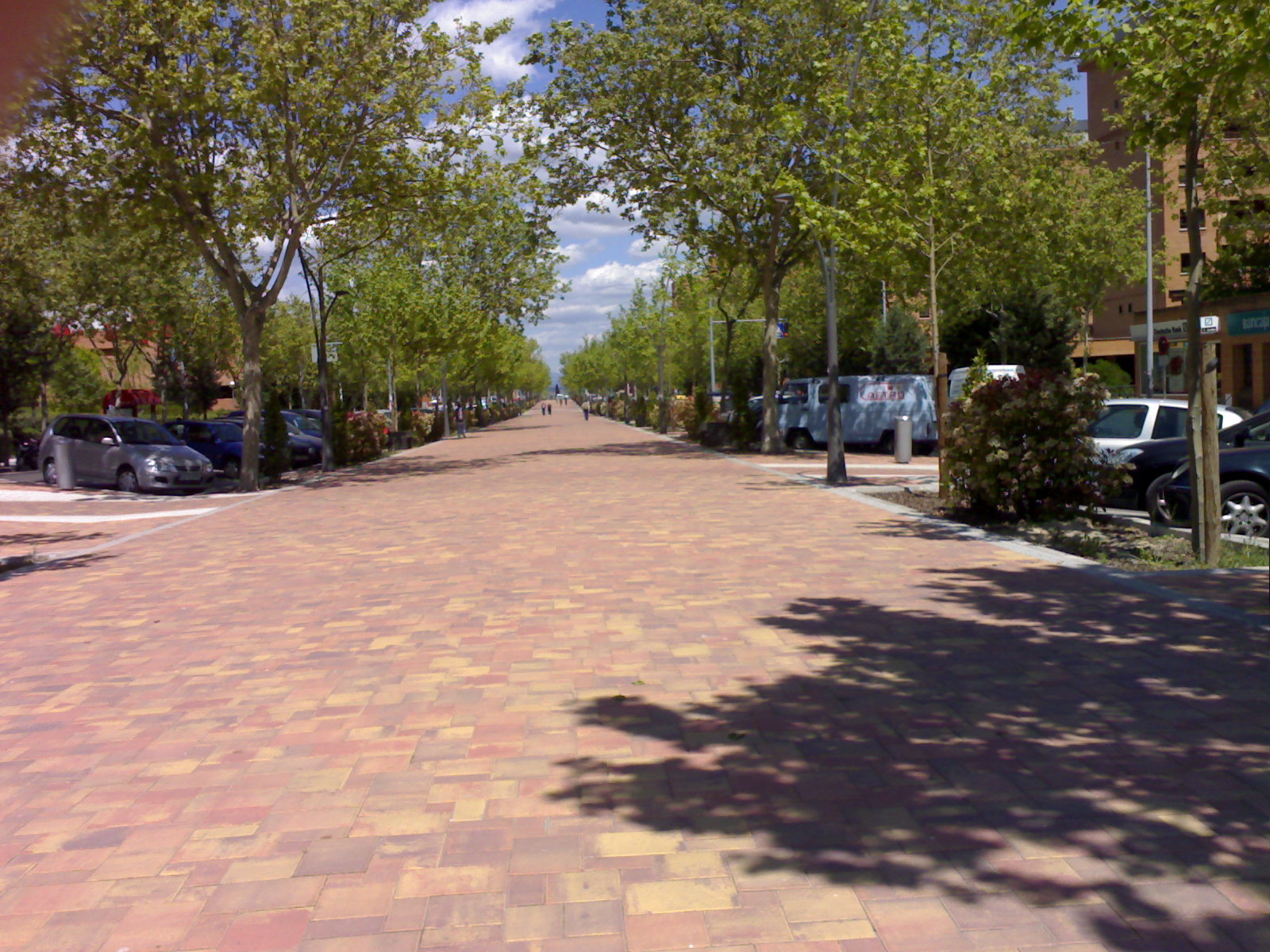 Una de las venas de la ciudad de Tres Cantos, en la Comunidad de Madrid (España).